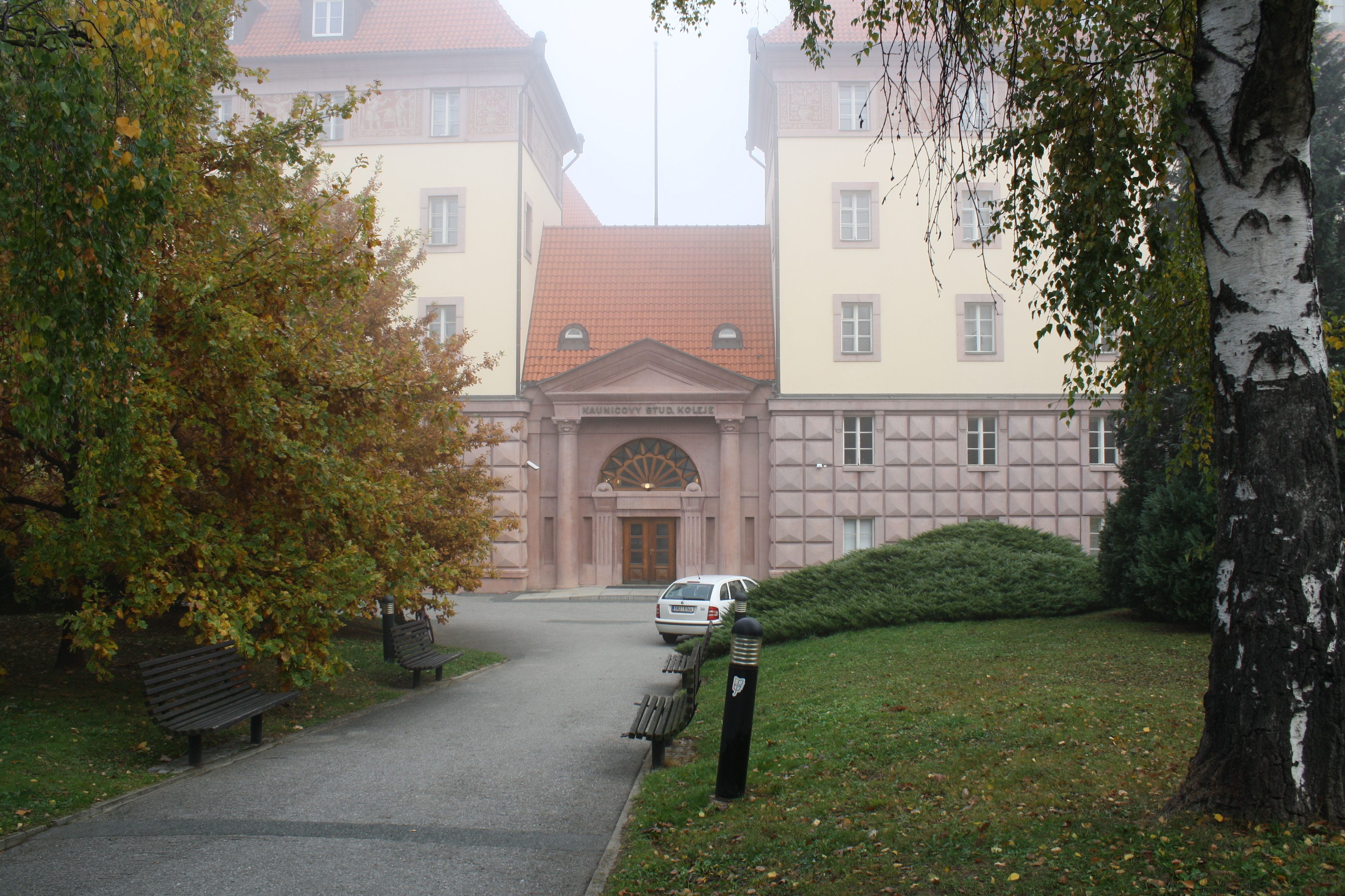 Koleje Veterinární a farmaceutické univerzity Brno